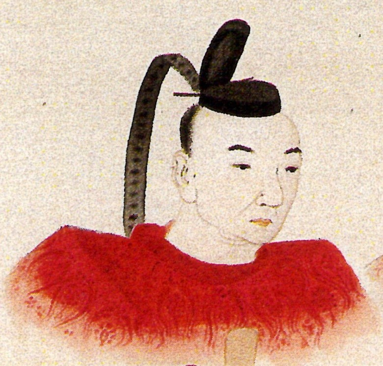 板倉重常の肖像。